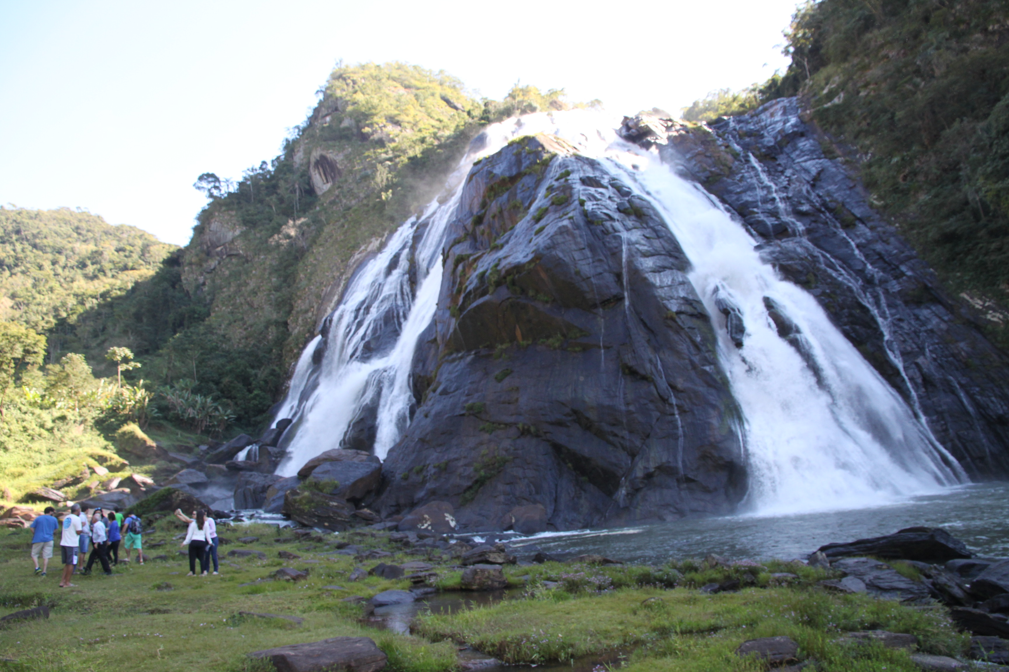 Cachoeira da Fumaça ist Namensgeber des parque estadual Cachoeira da Fumaça zwischen den Gemeinden Alegre und Ibitirama, beide in Espírito Santo.